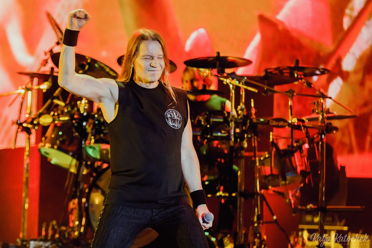 Валерий Кипелов на фестивале Moscow Metal Meeting 30.08.2014